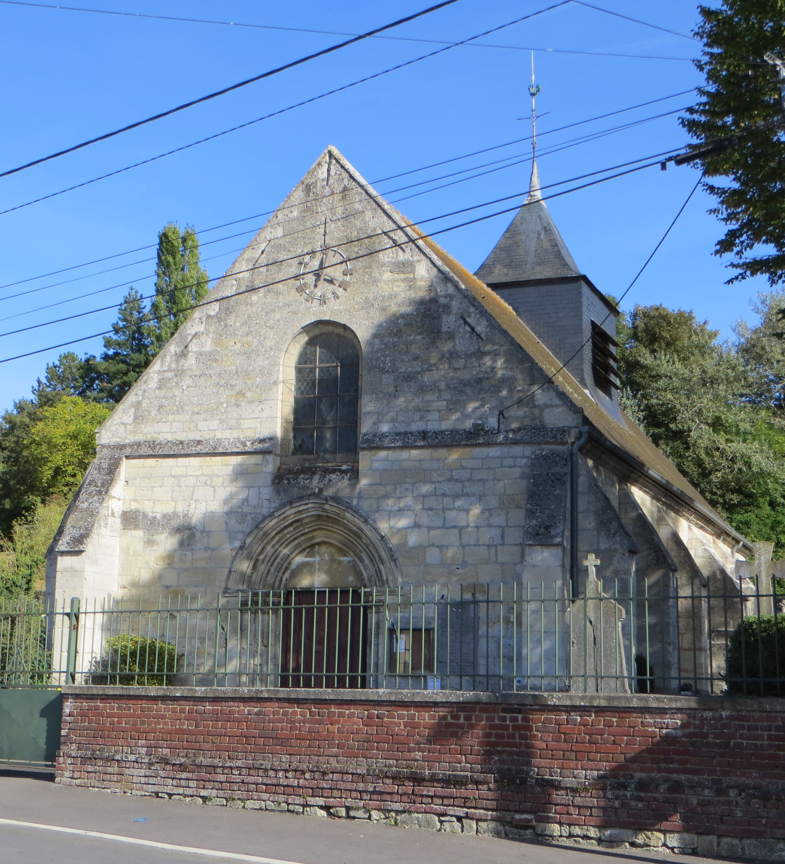 Vue générale de l'église